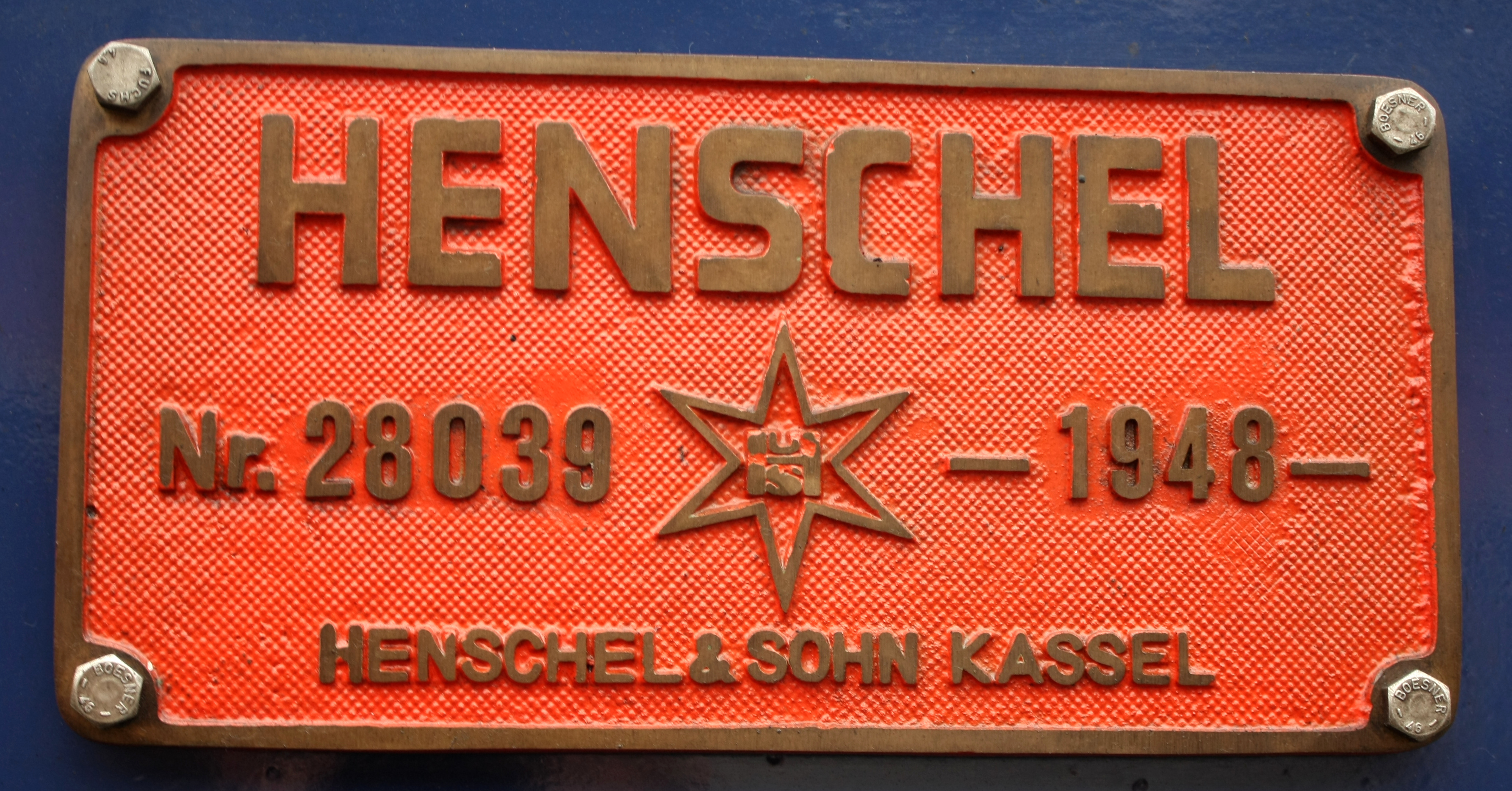 Henschel - Firmenschild an einer Lok